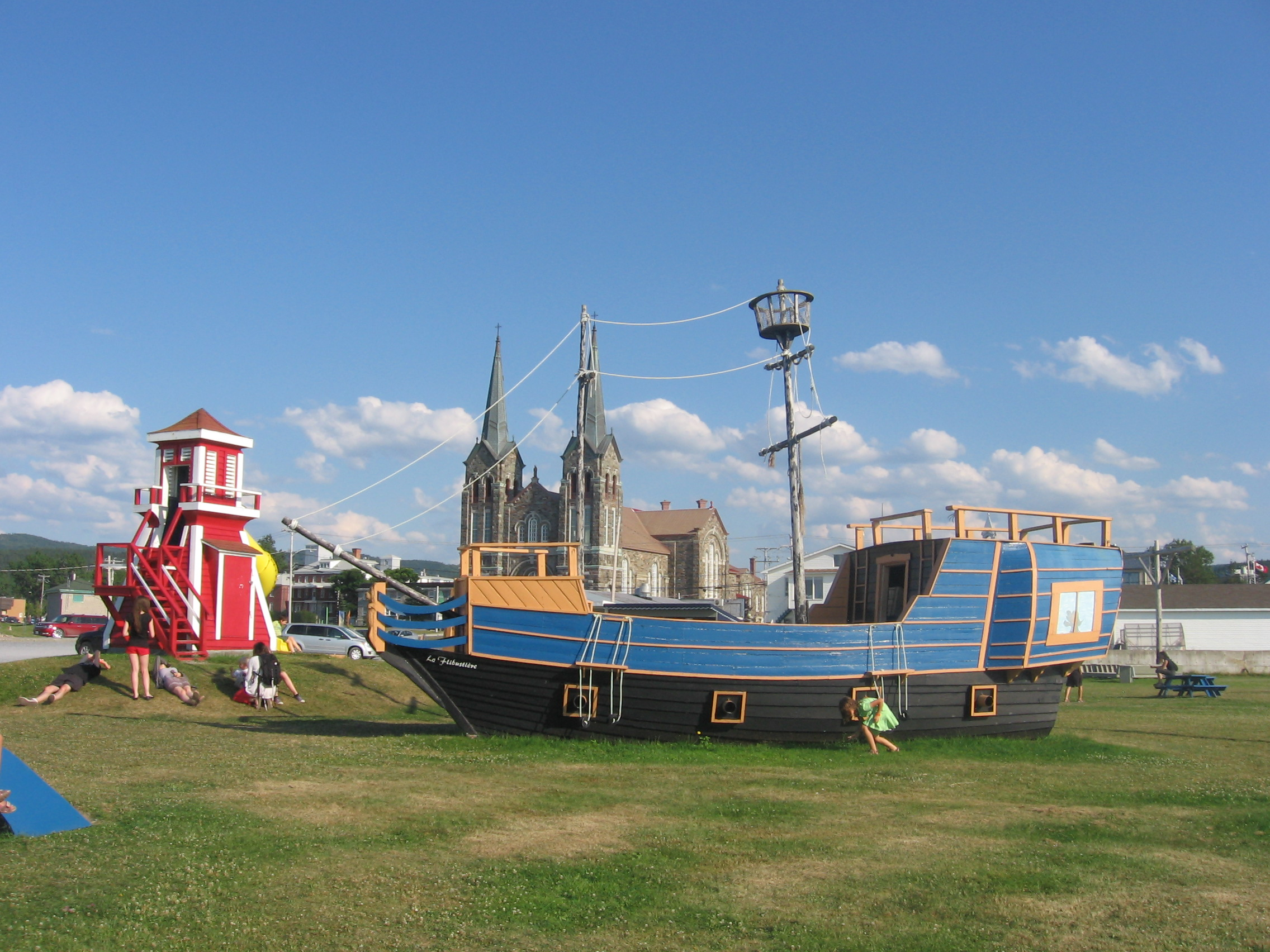 Parc Sainte-Anne-des-Monts